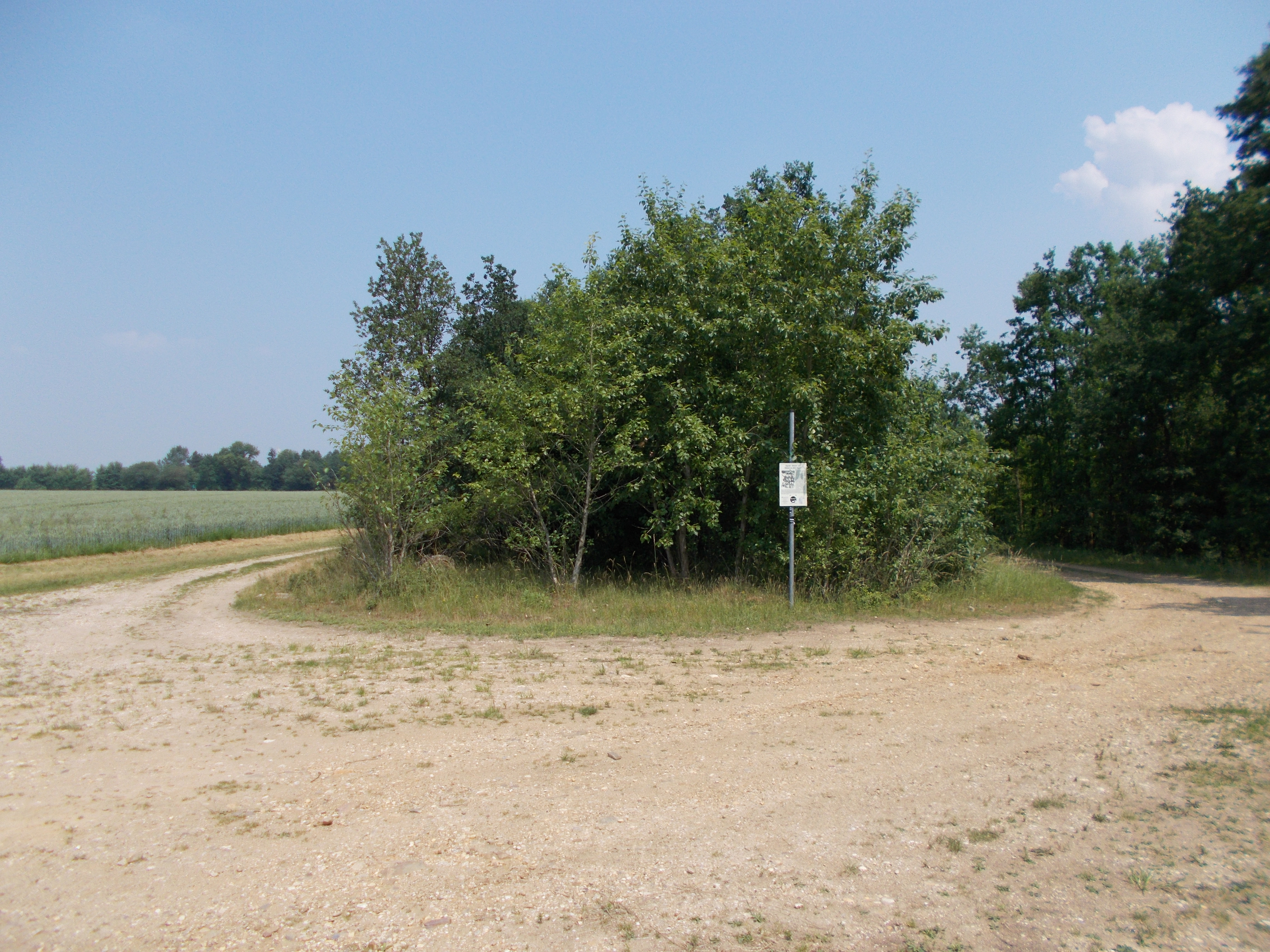 Ehemaliger Wohnort des Wehrwolfs. Der Ort Epprath wurde durch den Tagebau Garzweiler zerstört. Die Bewohner nach Kaster umgesiedelt.